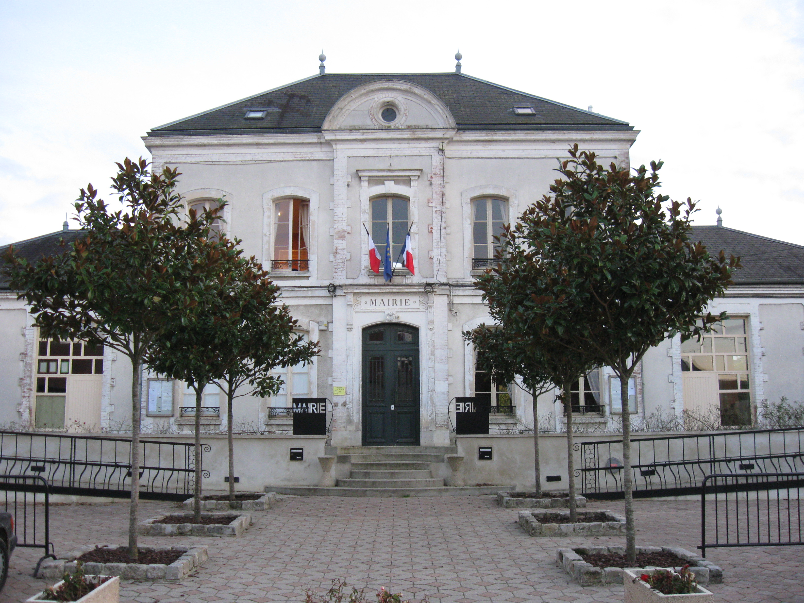 Mairie de Messy. (département de la Seine-et-Marne, région Île-de-France).